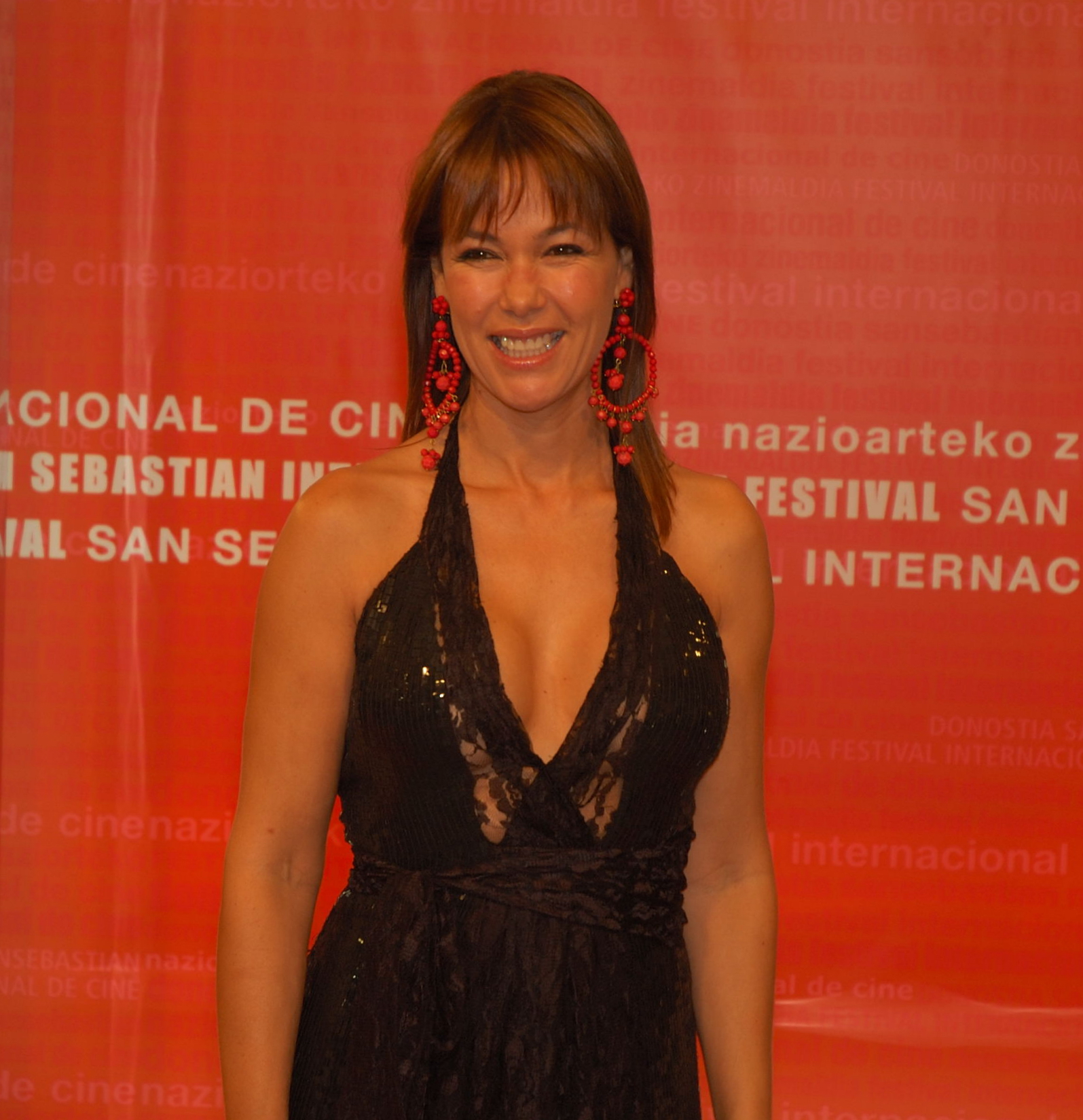 La actriz española Mabel Lozano en el Festival Internacional de Cine de San Sebastián 2006